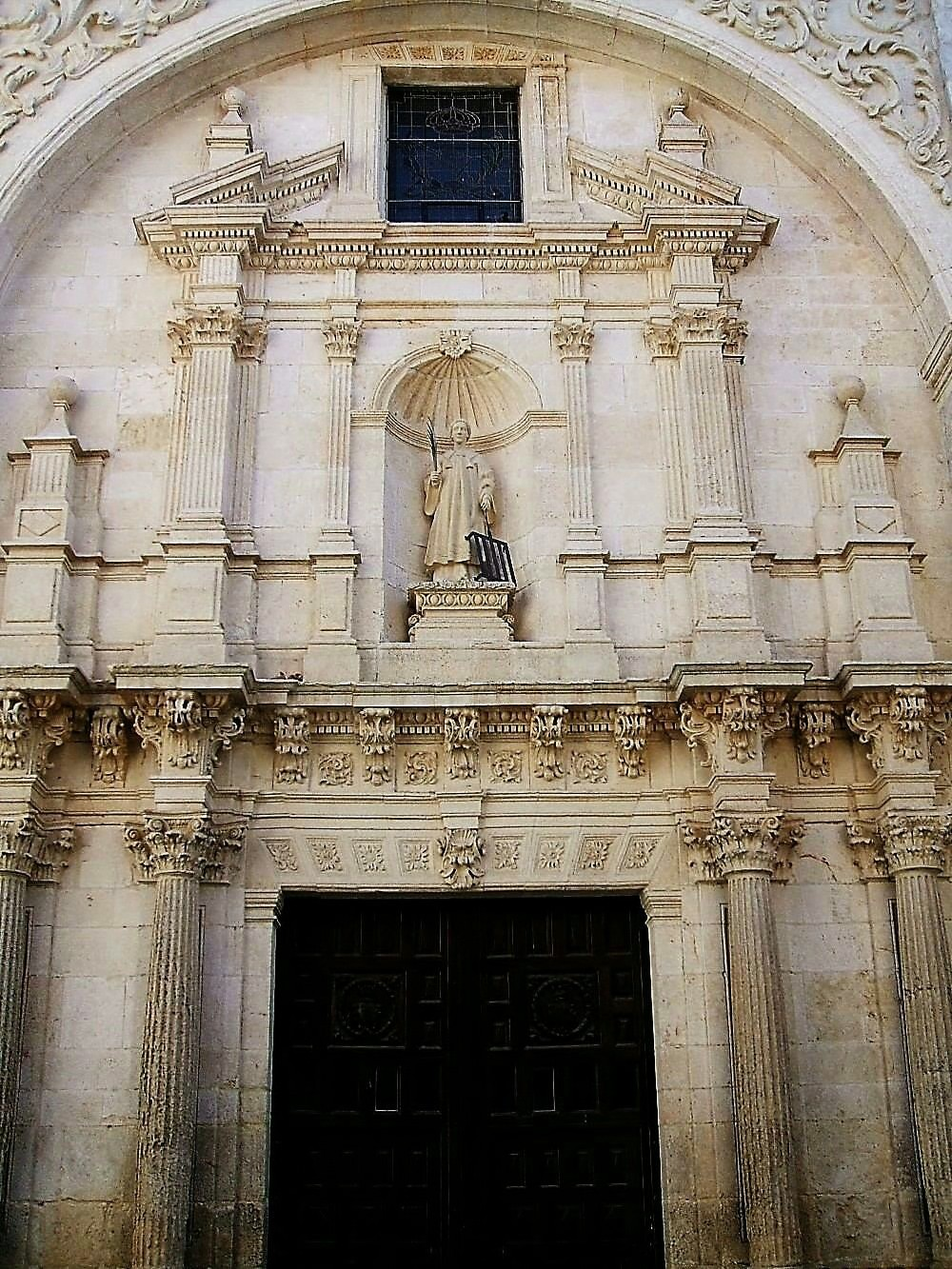 Portada barroca de la Iglesia de San Lorenzo (s-XVII), Burgos, Castilla y León, España/Spain